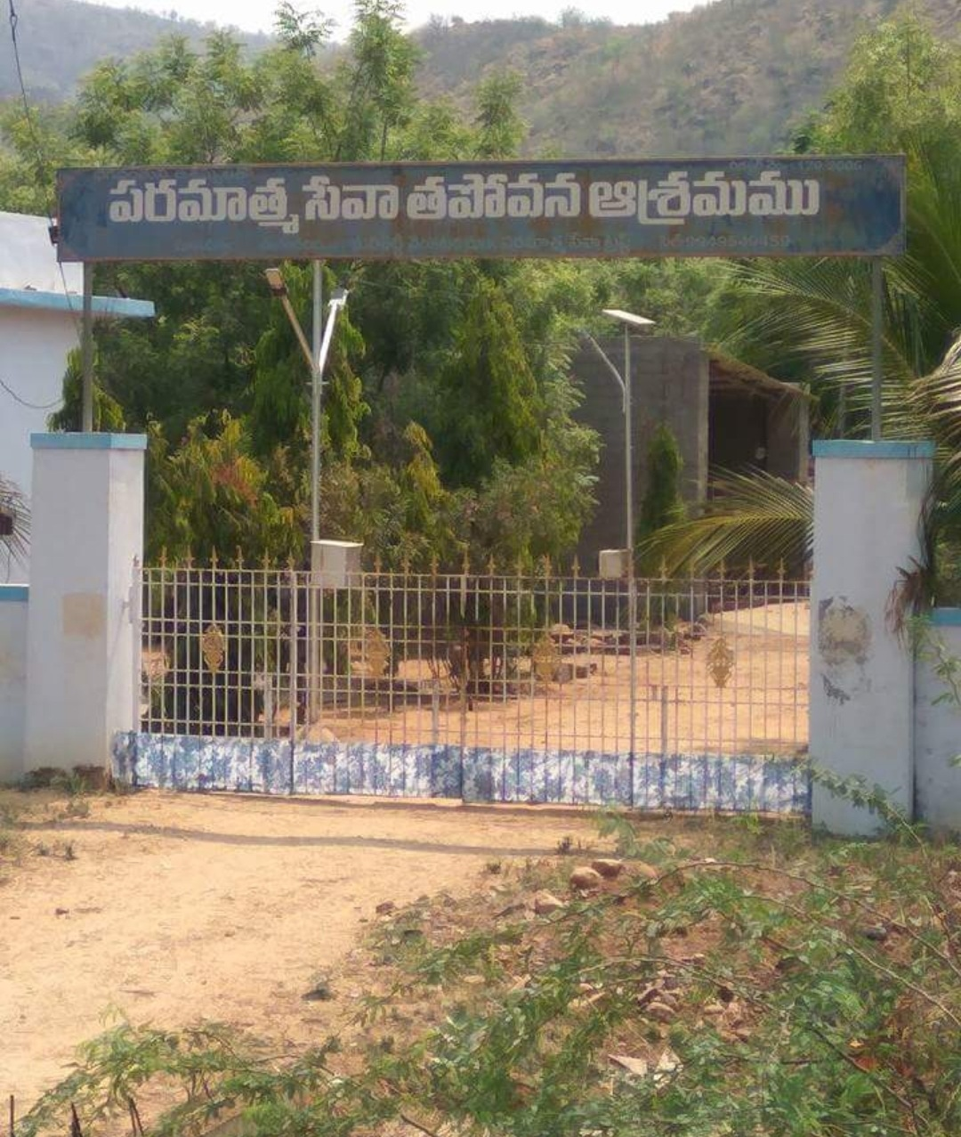 మలిశెట్టి వెంకటరమణ నిర్వహిస్తున్న పరమాత్మ సేవా తపోవనాశ్రమం